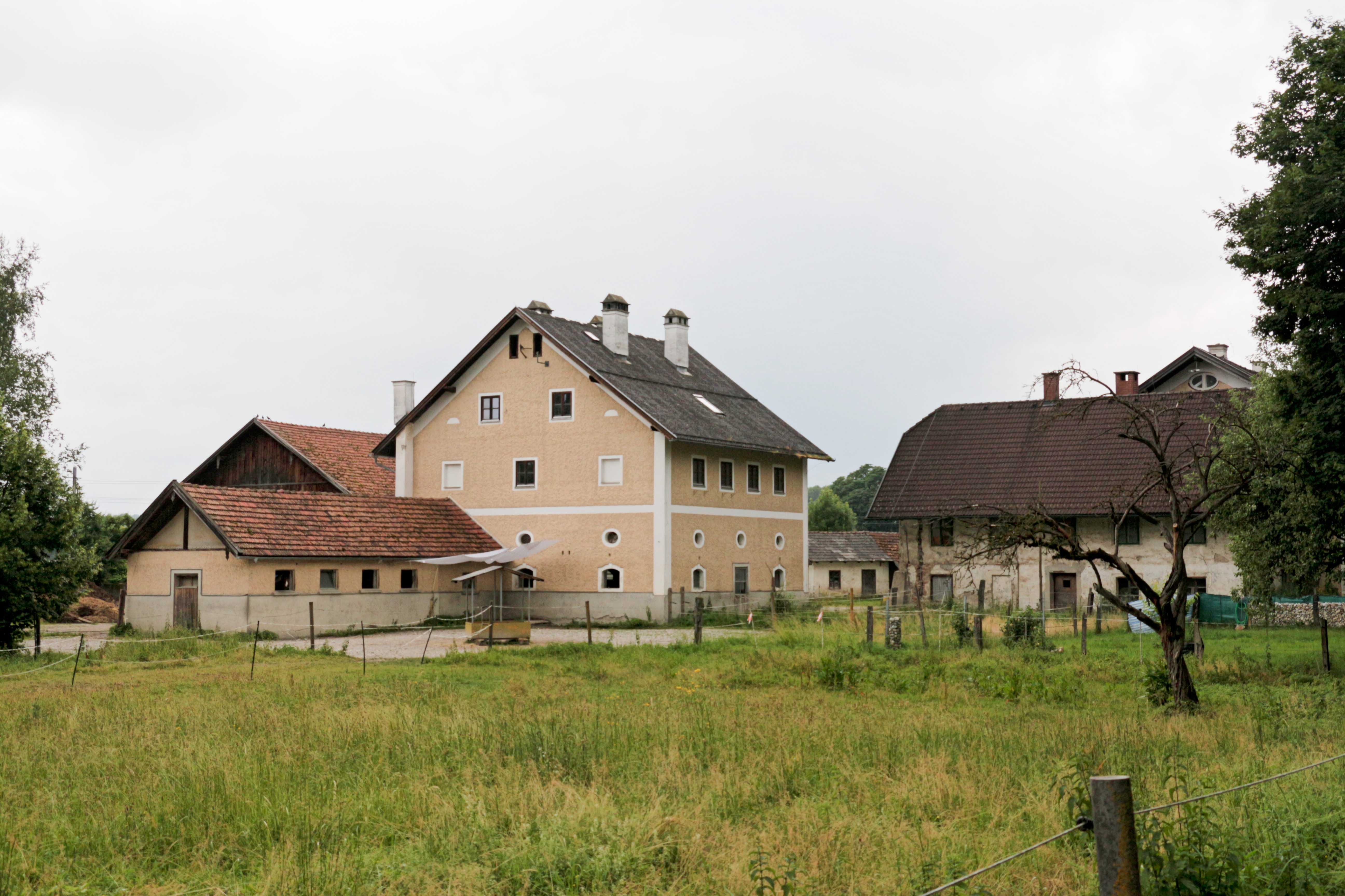 Gut Weitwörth, Gemeinde Nußdorf am Haunsberg